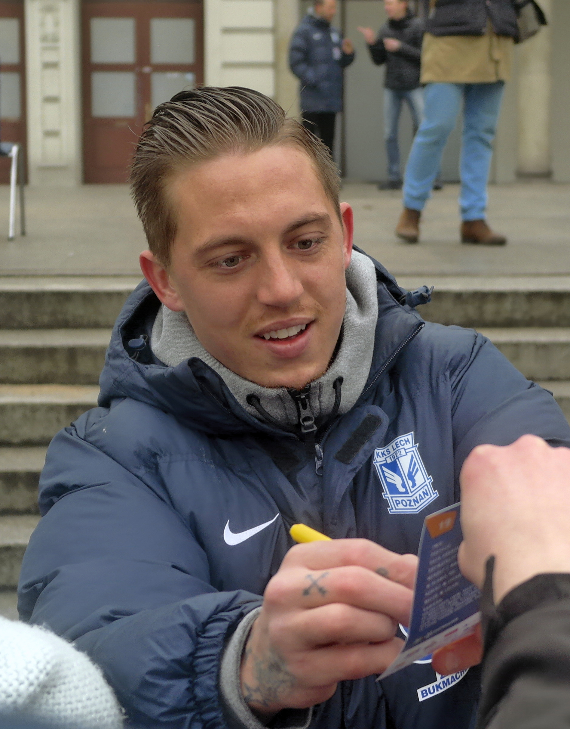 Nicki Bille Nielsen, piłkarz Lecha Poznań podczas akcji "Pierwszy Gwizdek" na Placu Wolności w Poznaniu